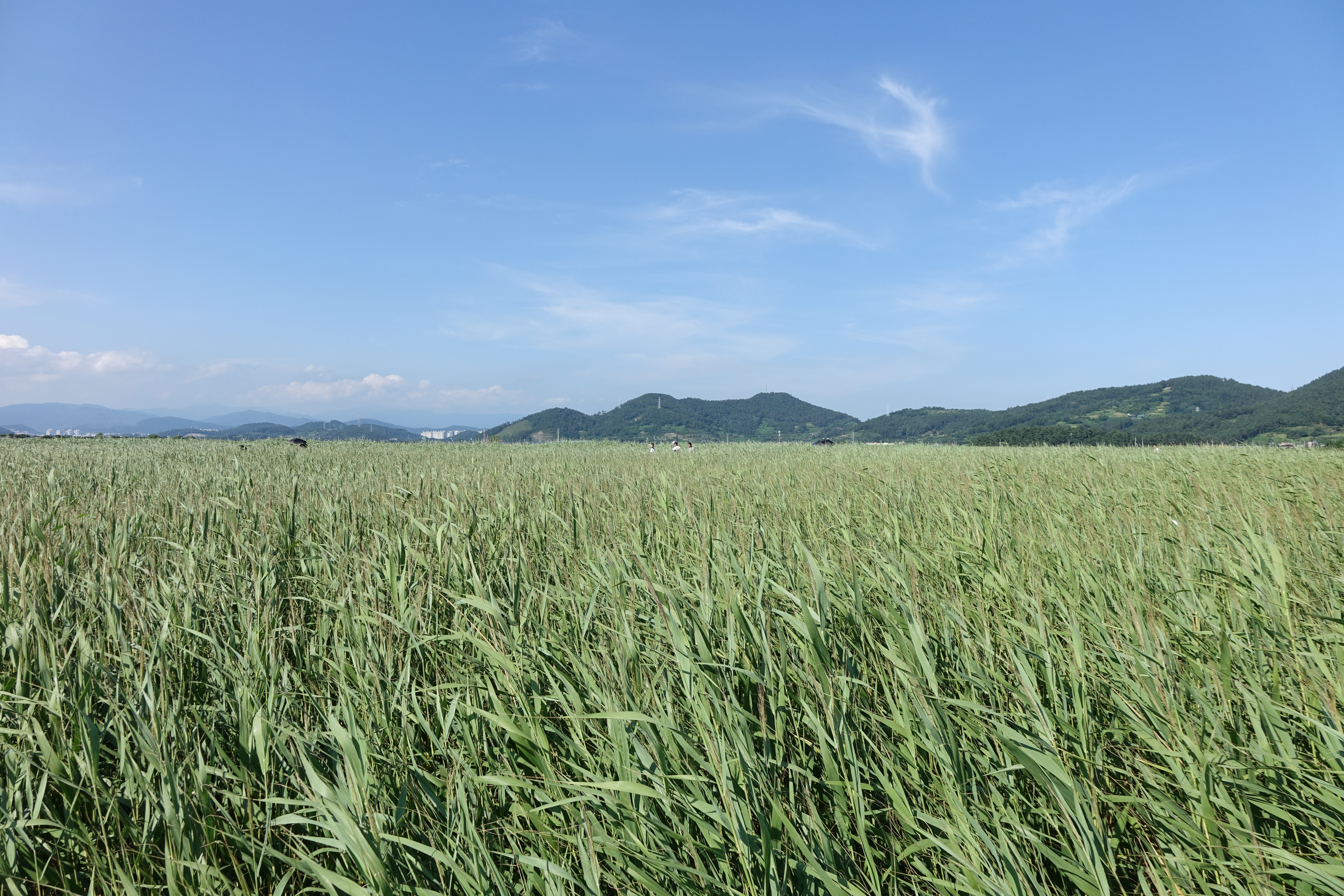 본인은 사진의 저작권자로서, 이 저작물을 'CC0 1.0 보편적 퍼블릭 도메인 기증' 저작권으로 배포합니다. 사진에 대해 궁금하신 점이나 원본 파일(ARW)을 원하시는 분은 010-7221-7119로 연락주세요. 감사합니다. 2015년 8월 10일. 최광모.